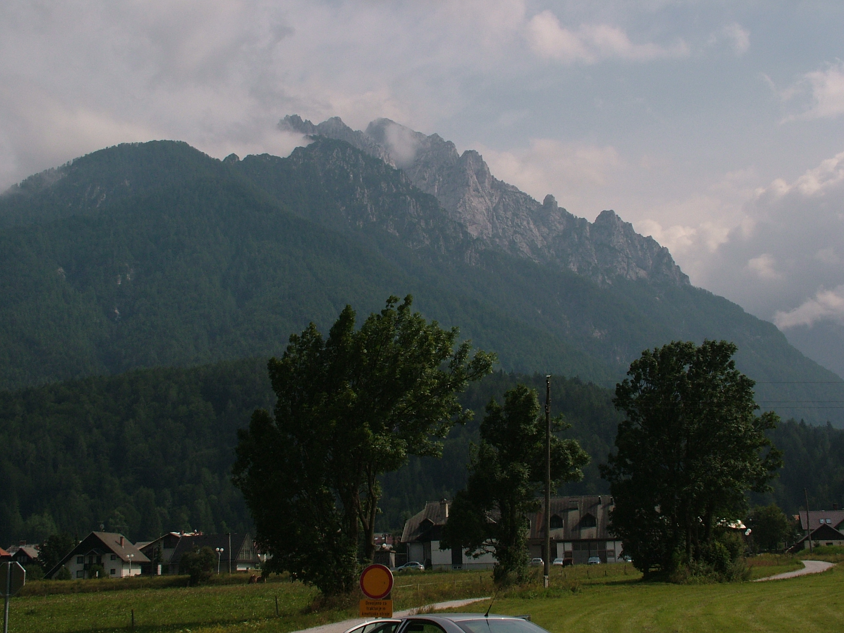 Wurzen-hágó, Auztria